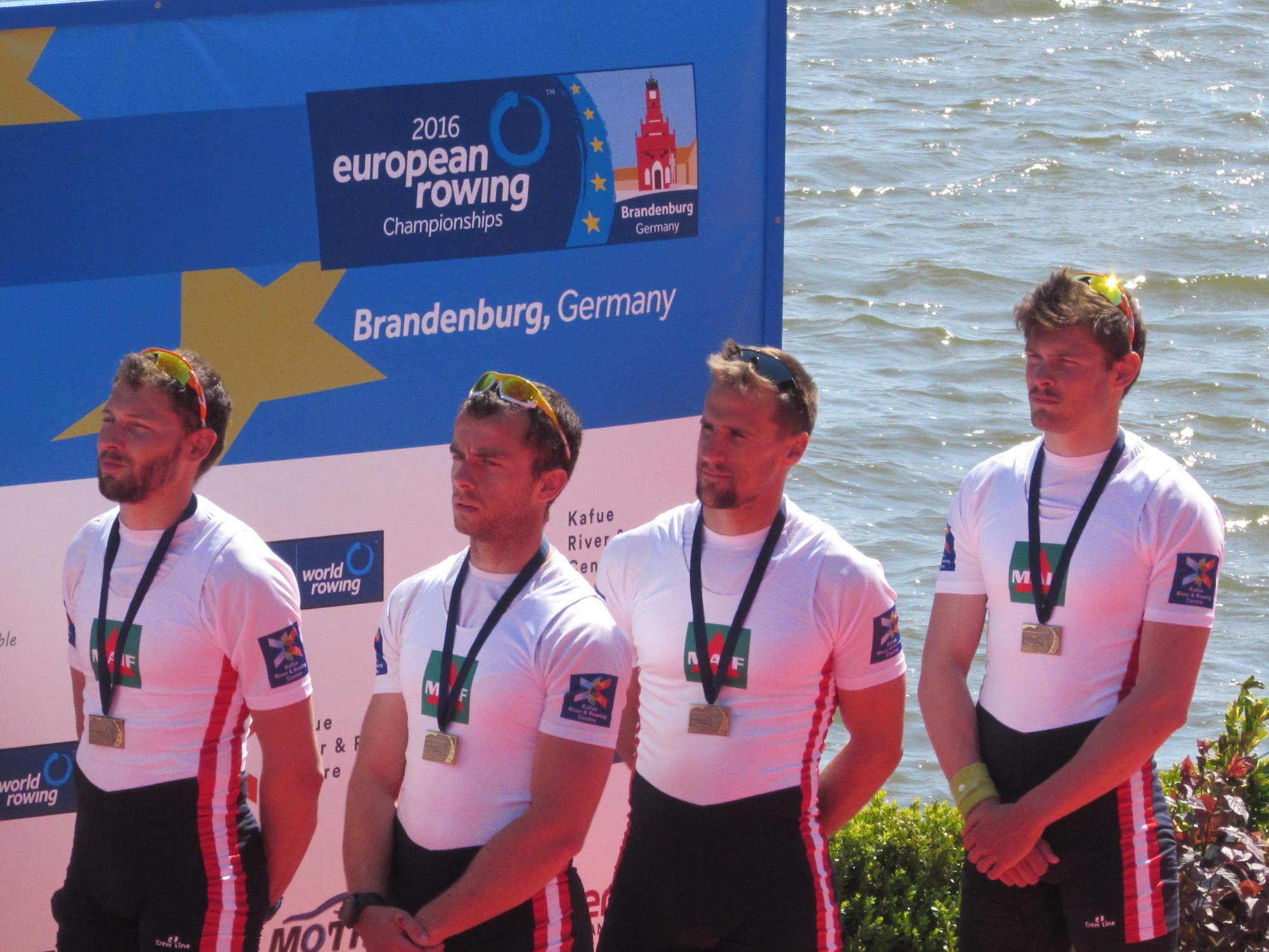 Theophile Onfroy, Mickael Marteau, Benjamin Lang, Valentin Onfroy, Ruder-EM 2016